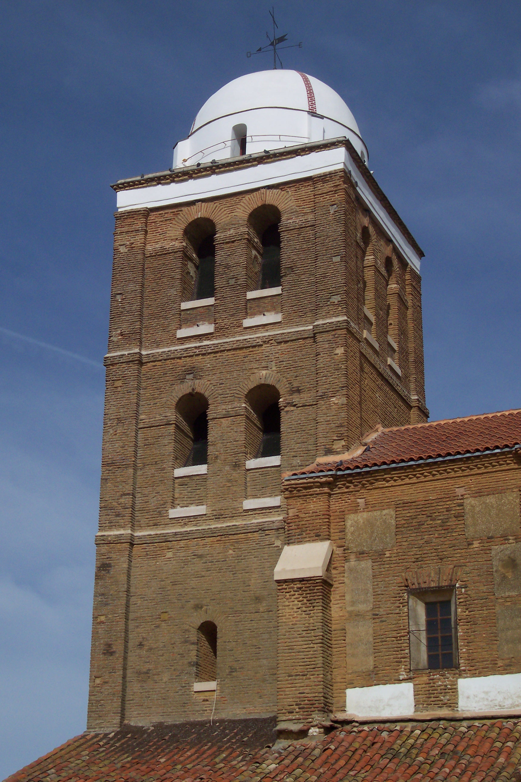 Detalle de la torre de la iglesia de San Juan en San Román de la Cuba (Palencia, España).